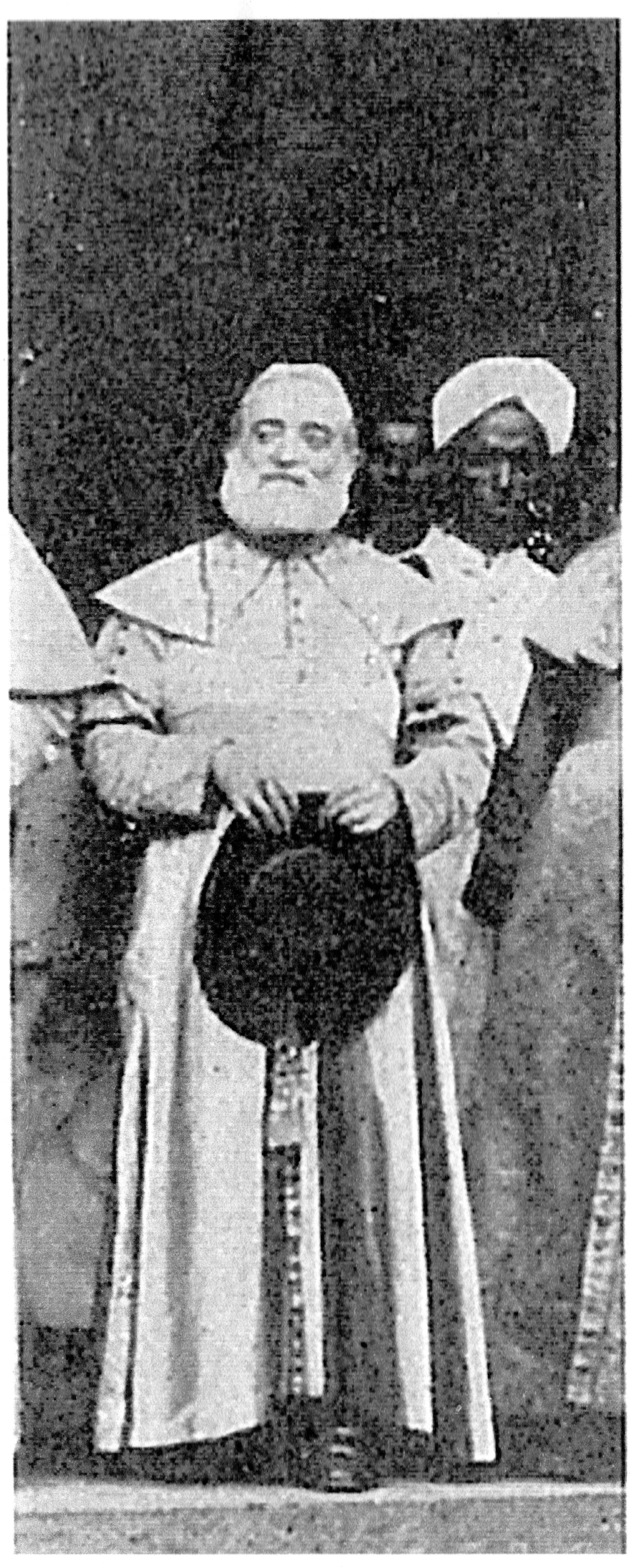 Monseigneur Barthe, père Jésuite, évêque de Trichinopoly (Inde) connu pour son action humanitaire